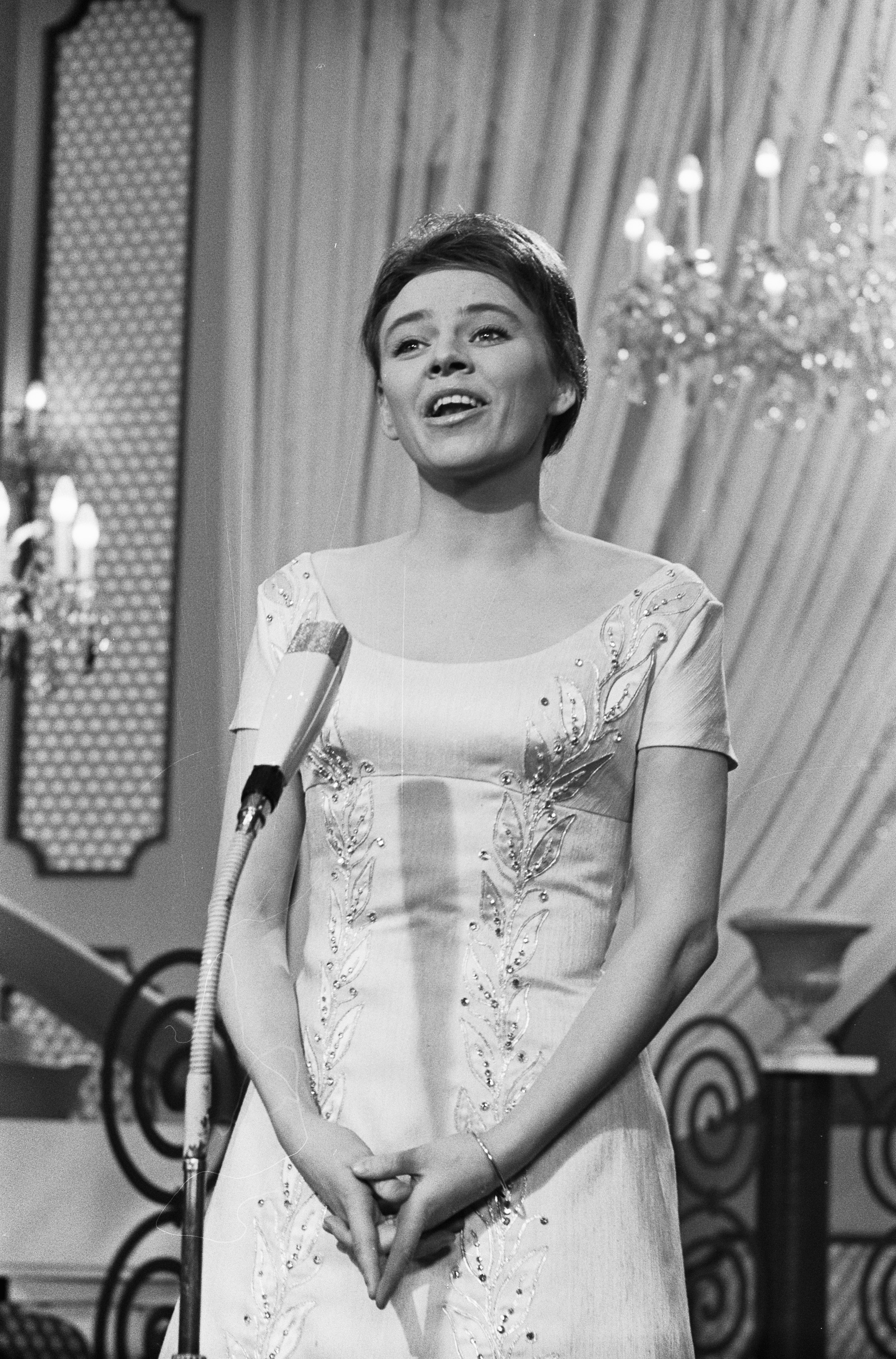 Collectie / Archief : Fotocollectie Anefo Reportage / Serie : [ onbekend ] Beschrijving : Eurovisie Songfestival 1962 te Luxemburg, voor Denemarken Ellen Winther Datum : 18 maart 1962 Locatie : Luxemburg, Luxemburg Trefwoorden : artiesten, songfestivals Persoonsnaam : Winther, Ellen Fotograaf : Pot, Harry / Anefo Auteursrechthebbende : Nationaal Archief Materiaalsoort : Negatief (zwart/wit) Nummer archiefinventaris : bekijk toegang 2.24.01.05 Bestanddeelnummer : 913-6601